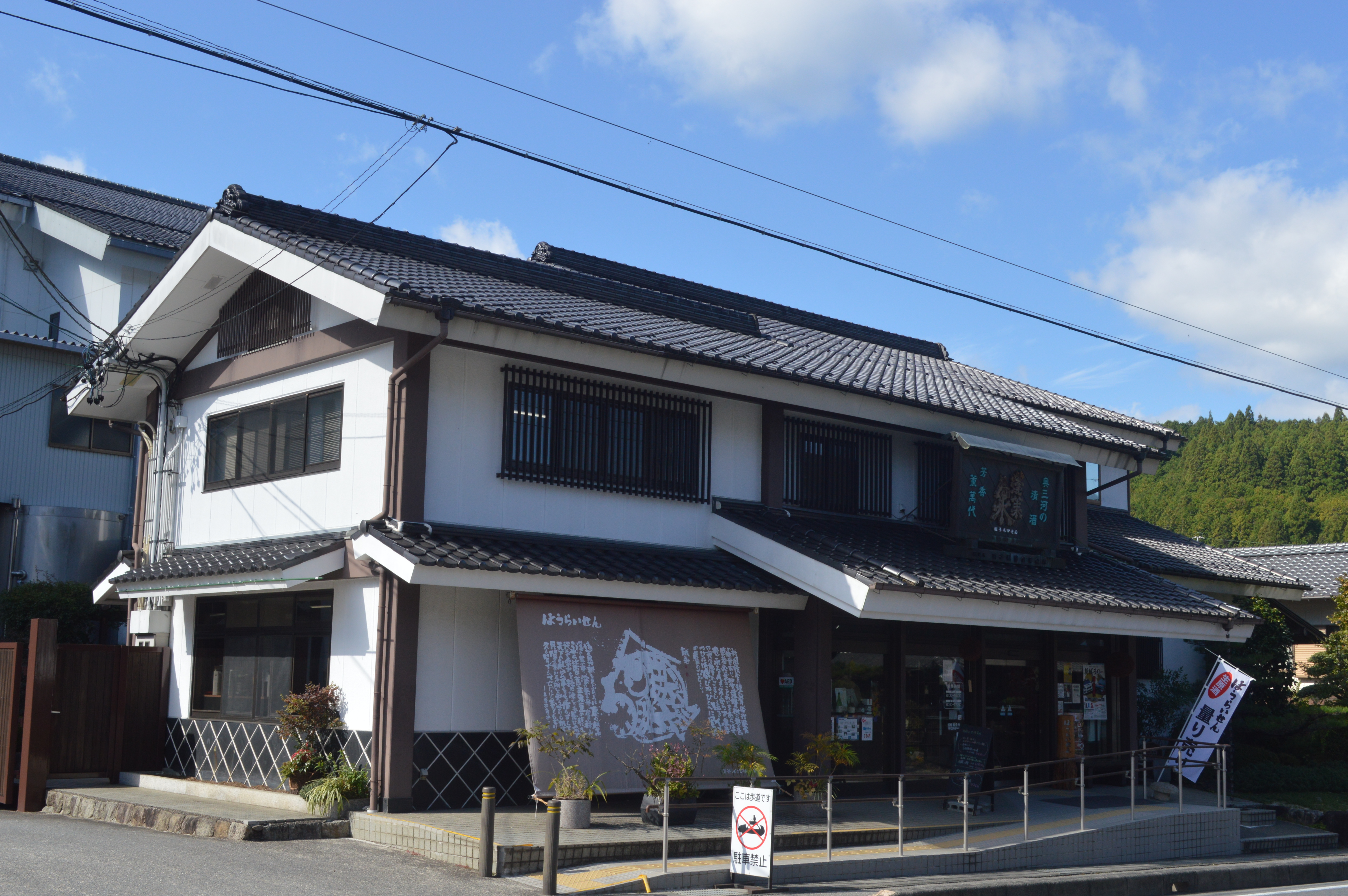 愛知県北設楽郡設楽町にある関谷醸造。